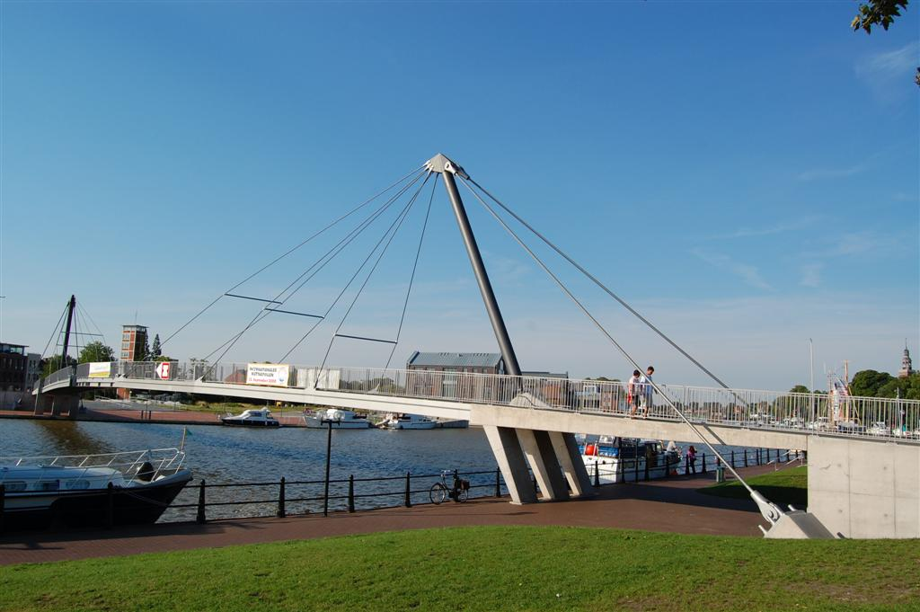 De voetgangersbrug over de jachthaven in het centrum van Leer.